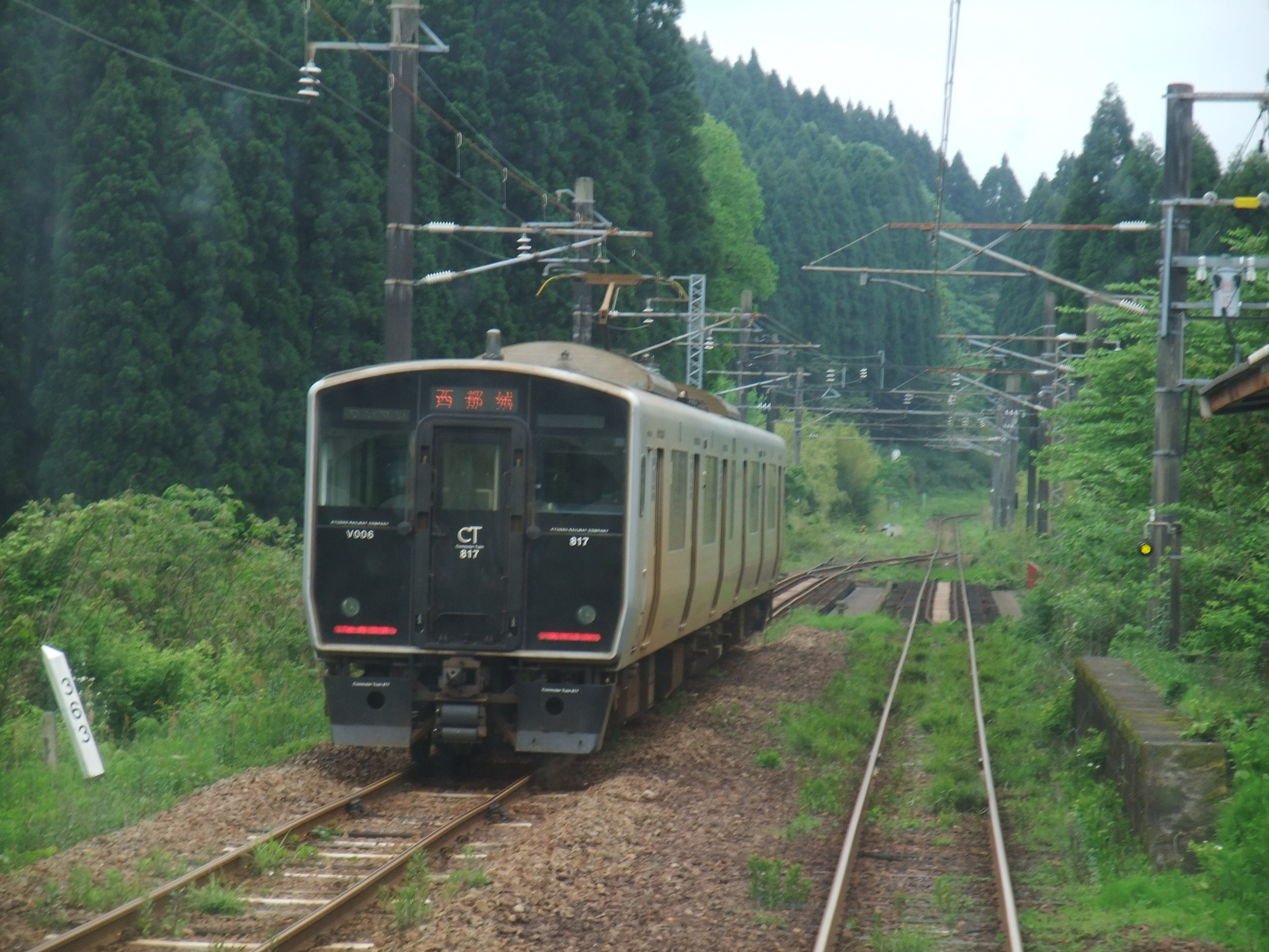 日豊本線門石信号場